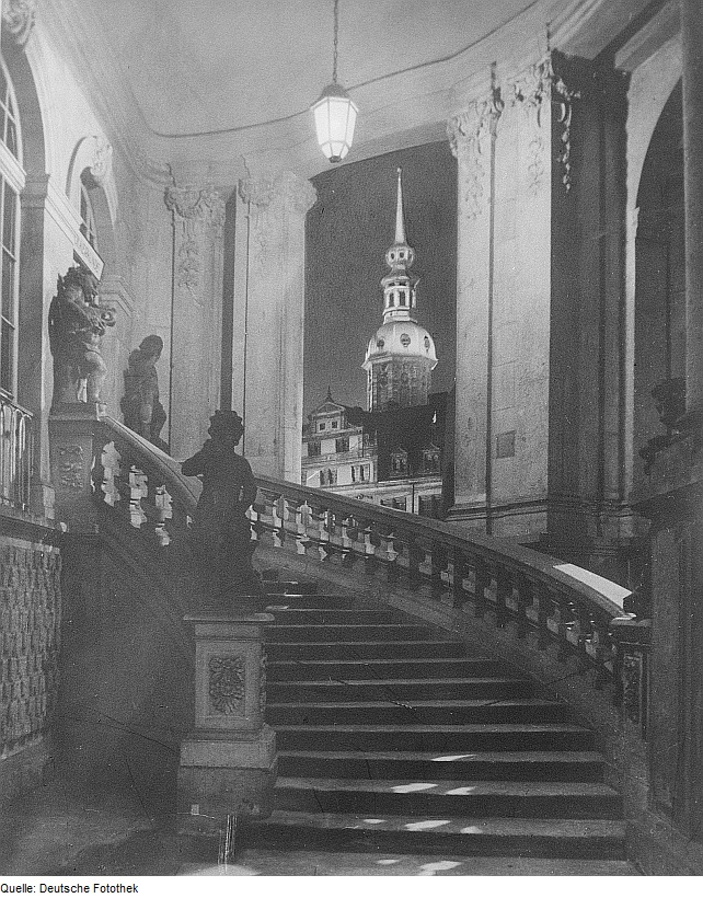 Original image description from the Deutsche FotothekDresden. Zwinger, Glockenspielpavillon, Blick über die Treppe durch einen Bogen gegen den Schloßturm